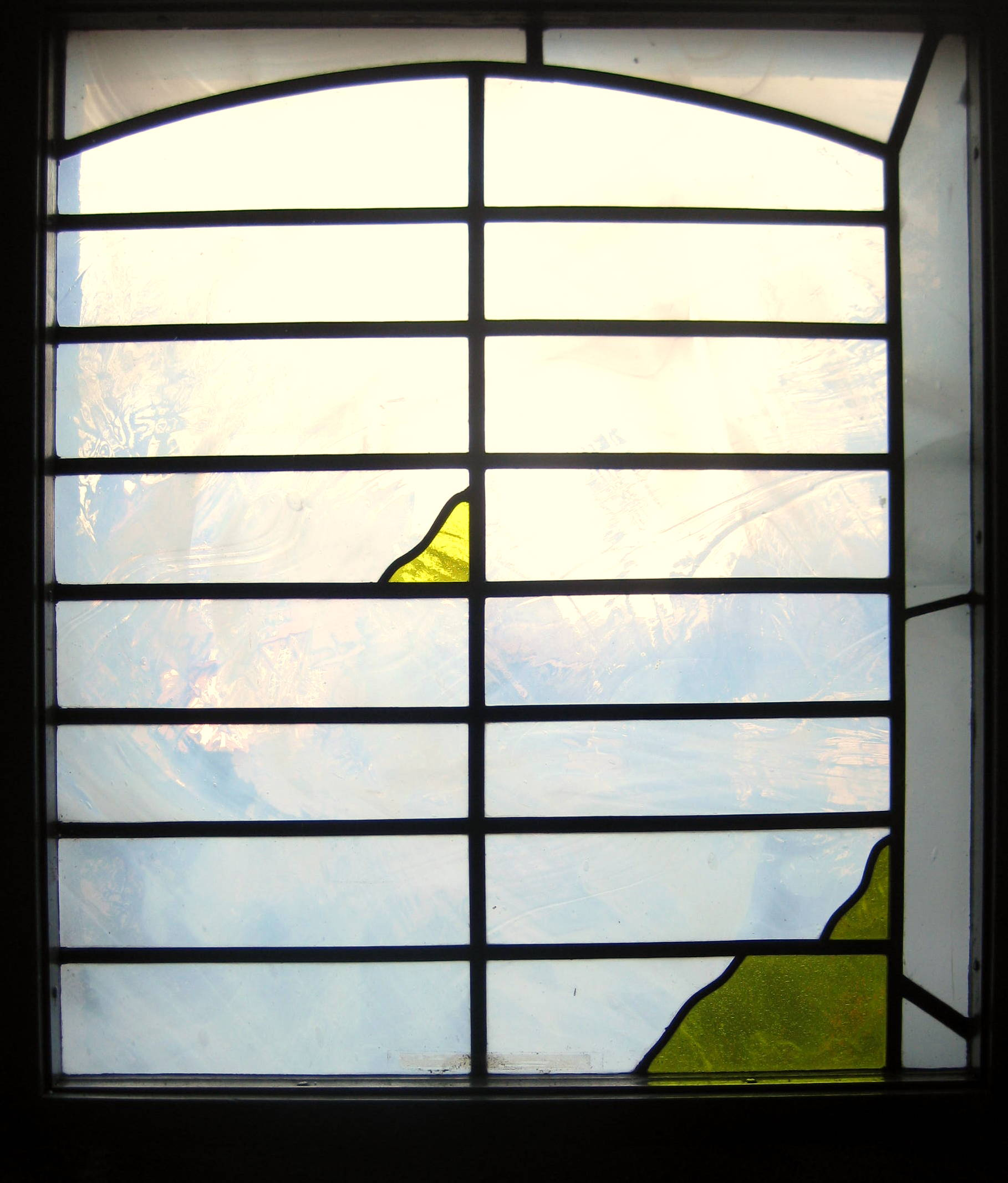 Kirchenfenster Neubau